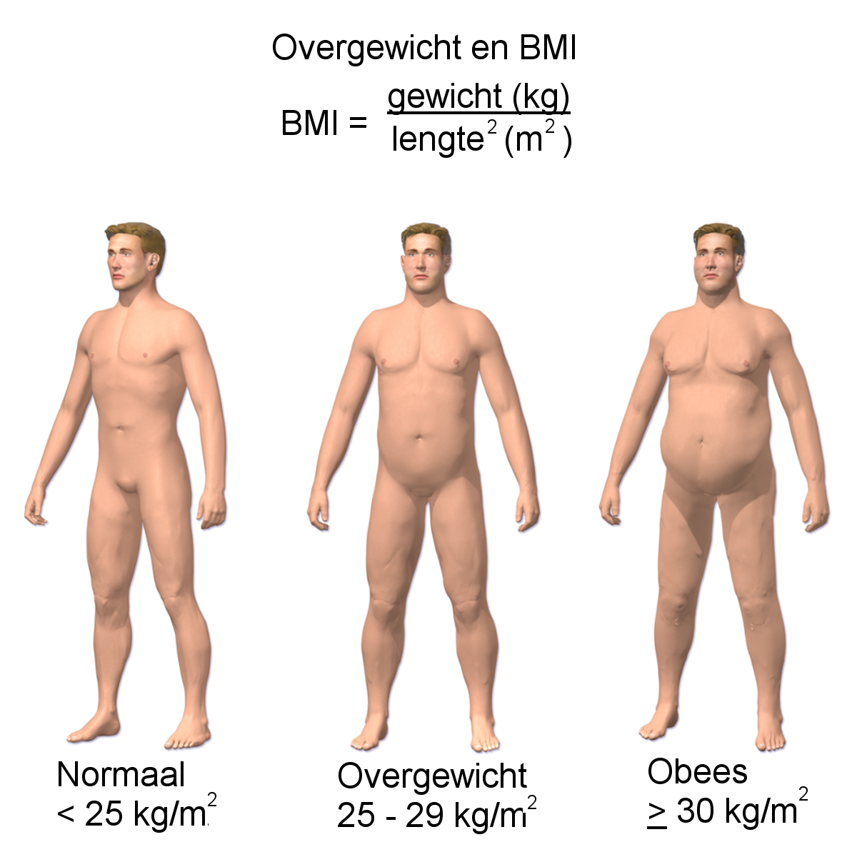 Overgewicht en BMI